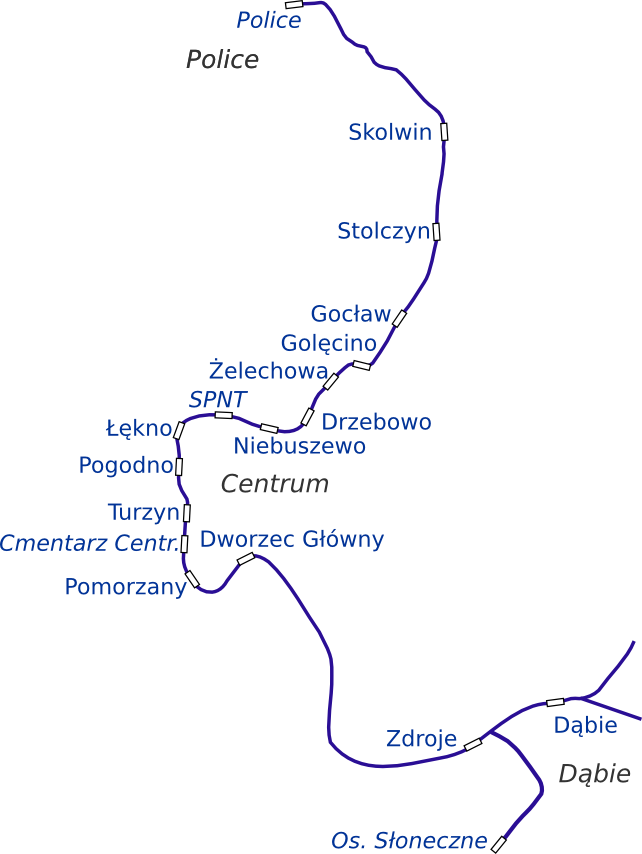 Źródło